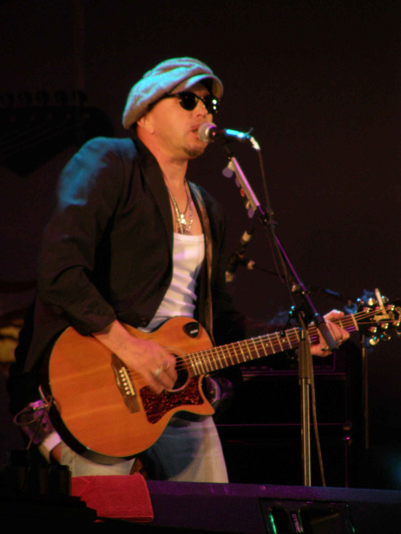 Концерт в парке Щербакова (Донецк) 6 июня 2010 года. Выступление группы «Неприкасаемые». Гарик Сукачёв.